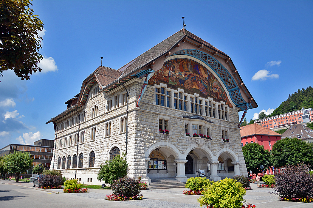 Ehemalige Rathaus von Le Locle (Schweiz)